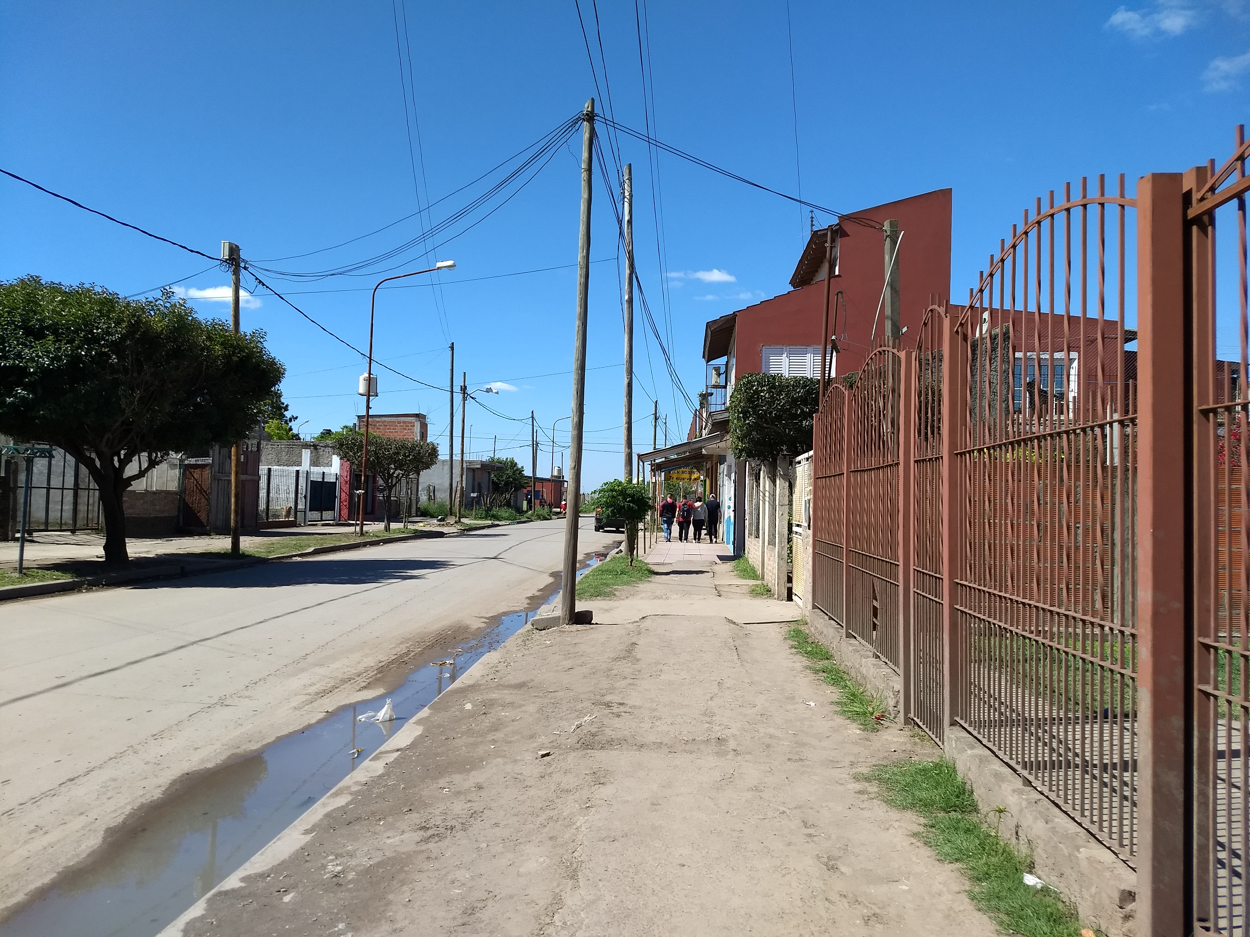 Calle Marcelo Gamboa, vista hacia intersección con calle Leonardo Da Vinci, Rafael Castillo, provincia de Buenos Aires.